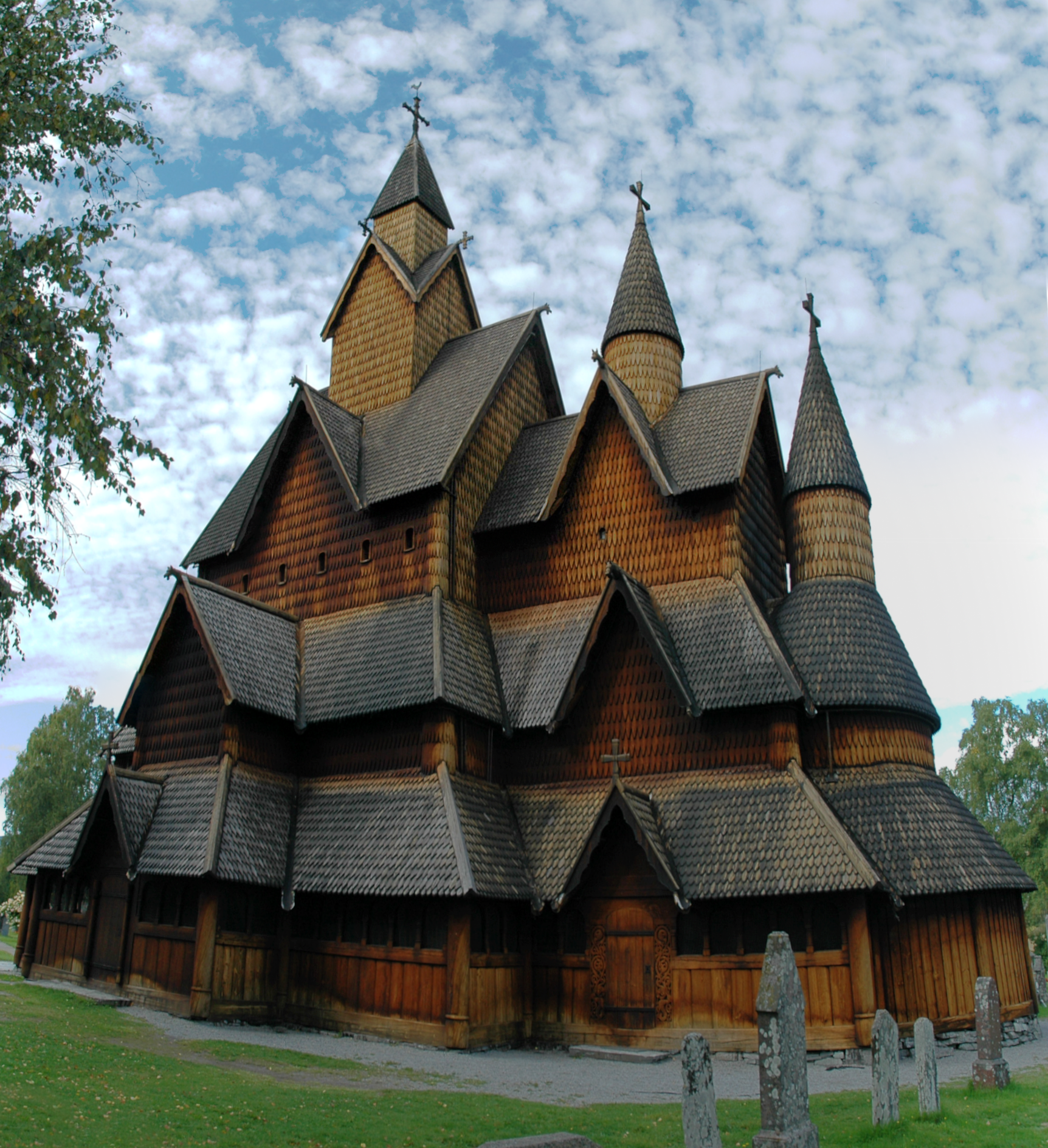 Stabkirche in Heddal, Norwegen